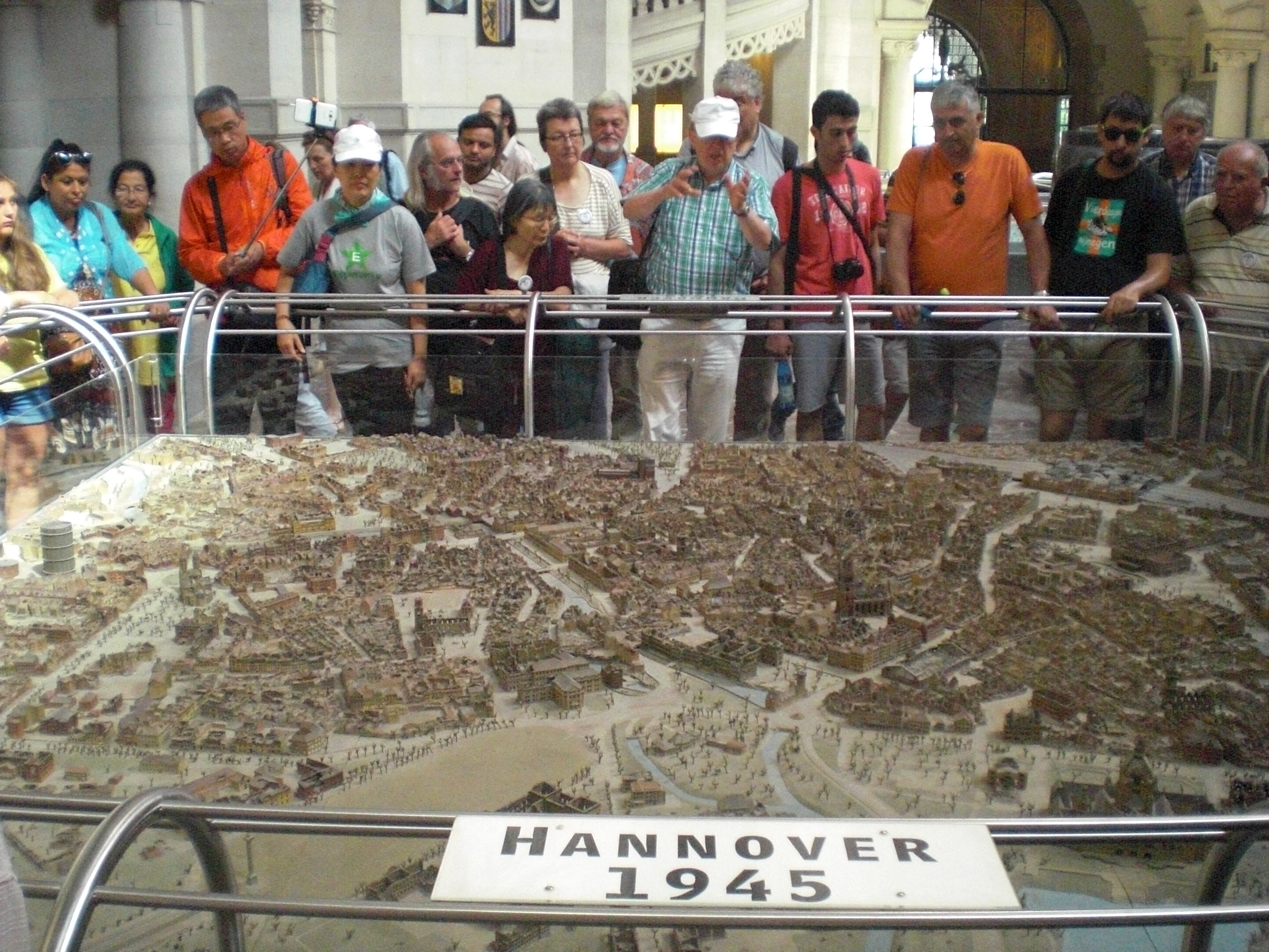 Esperantistoj ricevante klarigojn pri la detruo de Hanovro dum la Dua Mondmilito